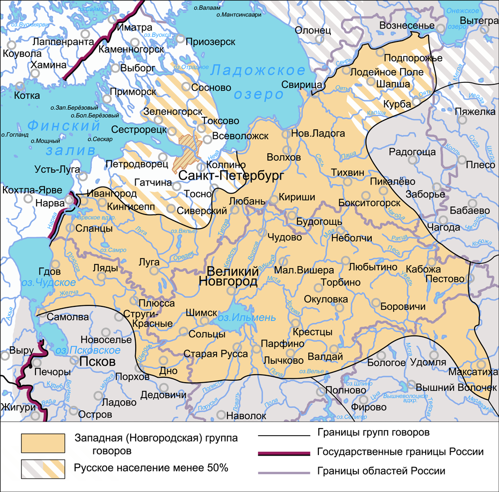 Западная (Новгородская) группа говоров с диалектологической карты русского языка 1915 года. На основе данных: К. Ф. Захарова, В. Г. Орлова. Диалектное членение русского языка. М.: Наука, 1970. 2-е изд.: М.: Едиториал УРСС, 2004 Русские. Монография Института этнологии и антропологии Н.Н. Дурново, Н. Н. Соколов, Д. Н. Ушаков. Опыт диалектологической карты русского языка в Европе, М., 1915